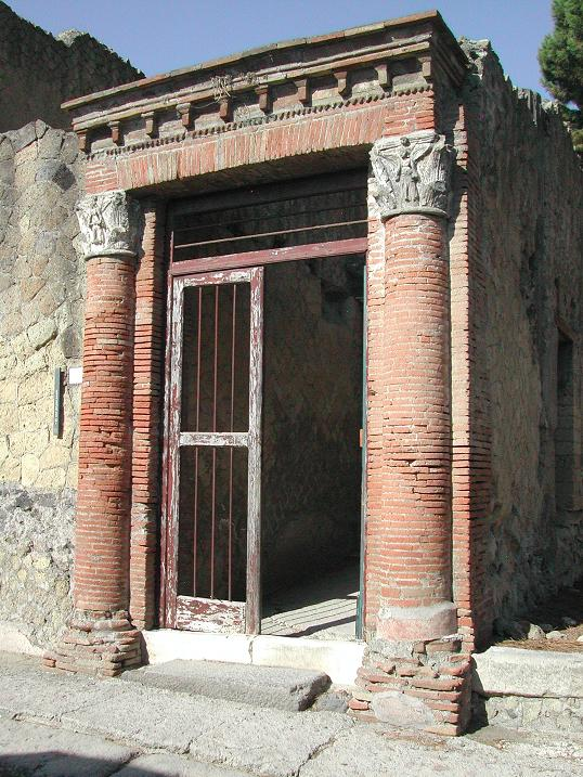 Casa del Gran Portale foto di Aldo Ardetti (14 agosto 2007)